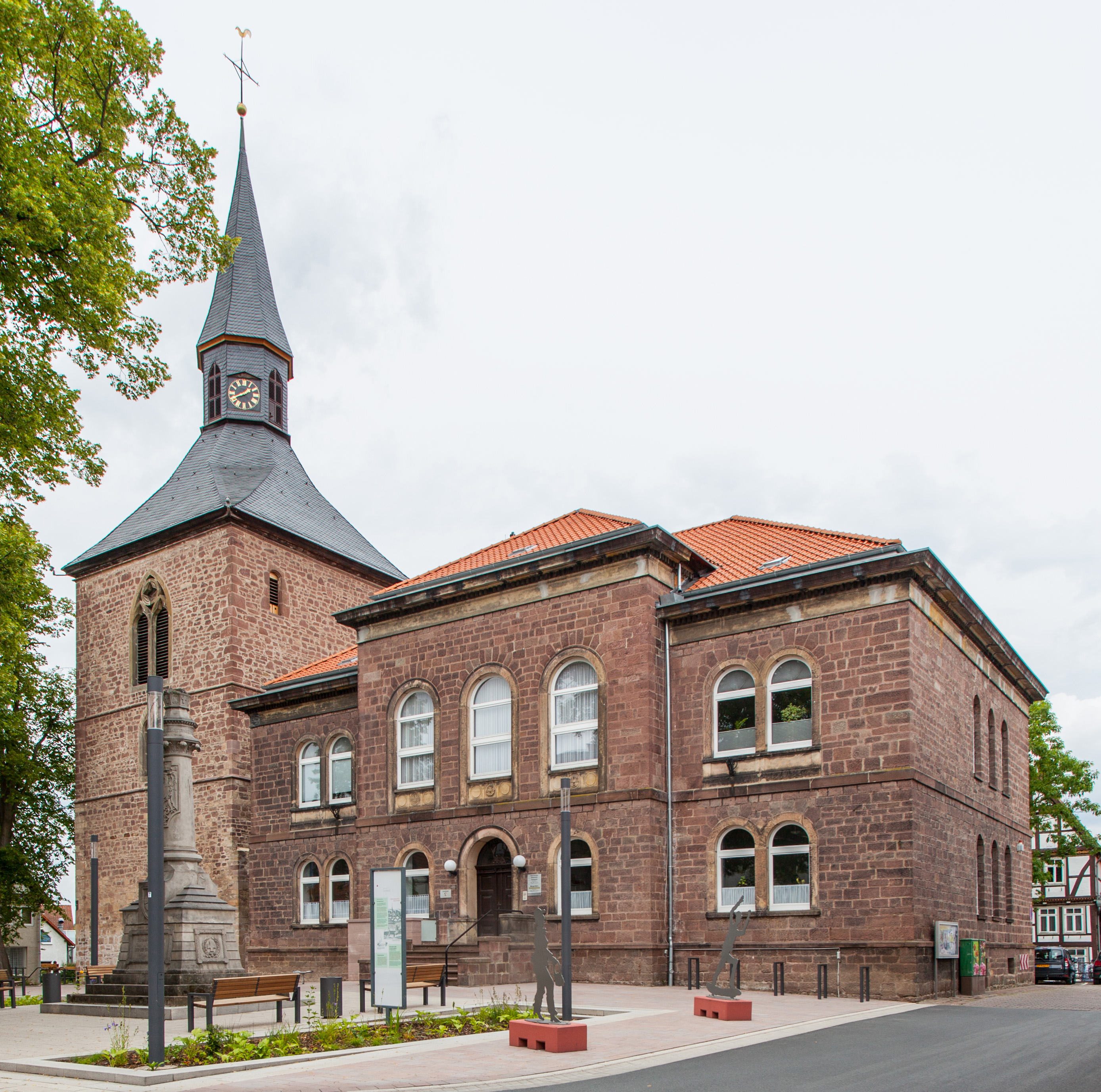 Blomberg, Glockenturm der Martinikirche und ehemaliges Amtsgericht This is a photograph of an architectural monument. /13